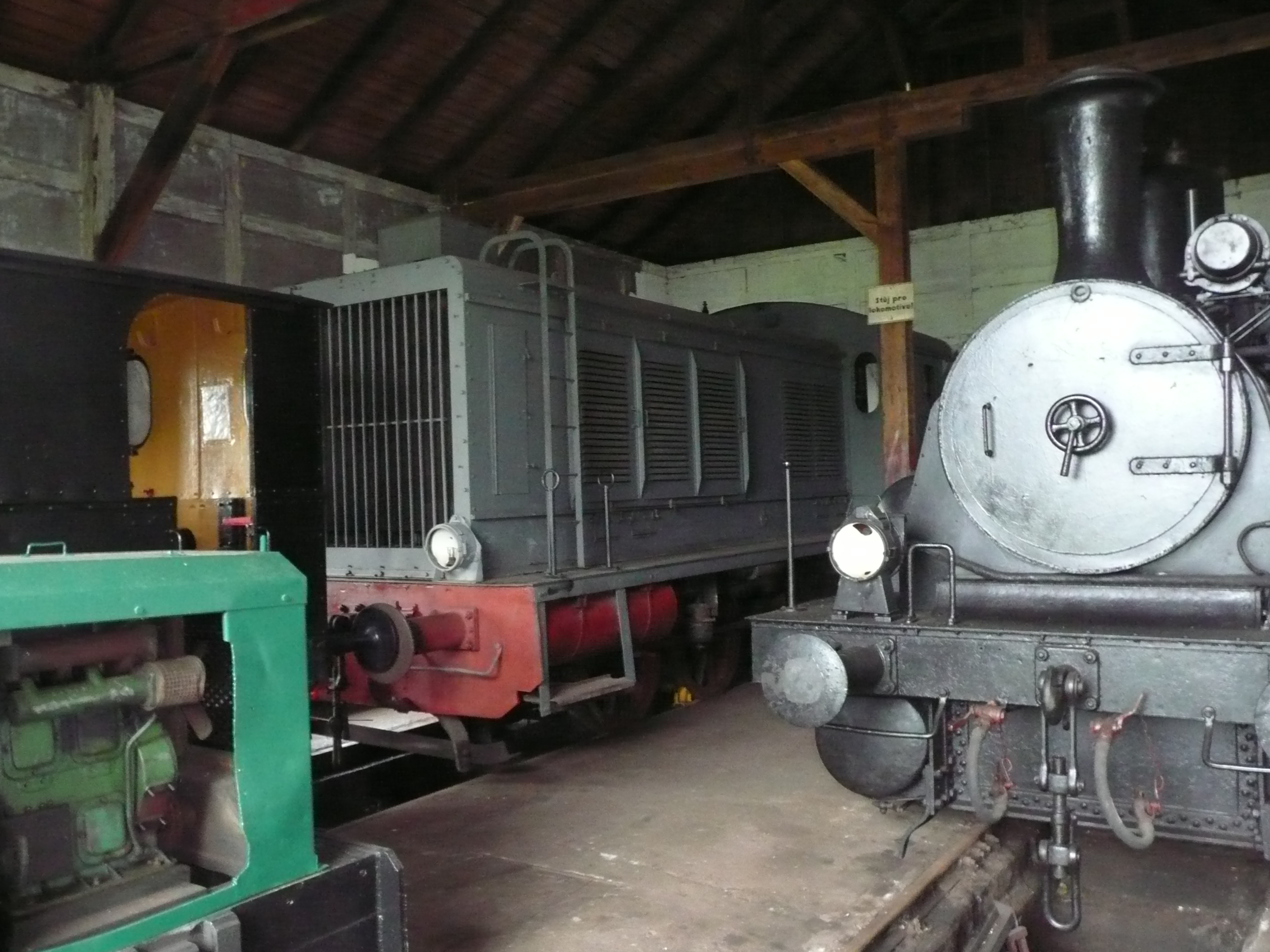 T334.004 im Eisenbahnmuseum Zlonice, rechts ist eine dreiachsige Lokomotive von Orenstein & Koppel zu sehen